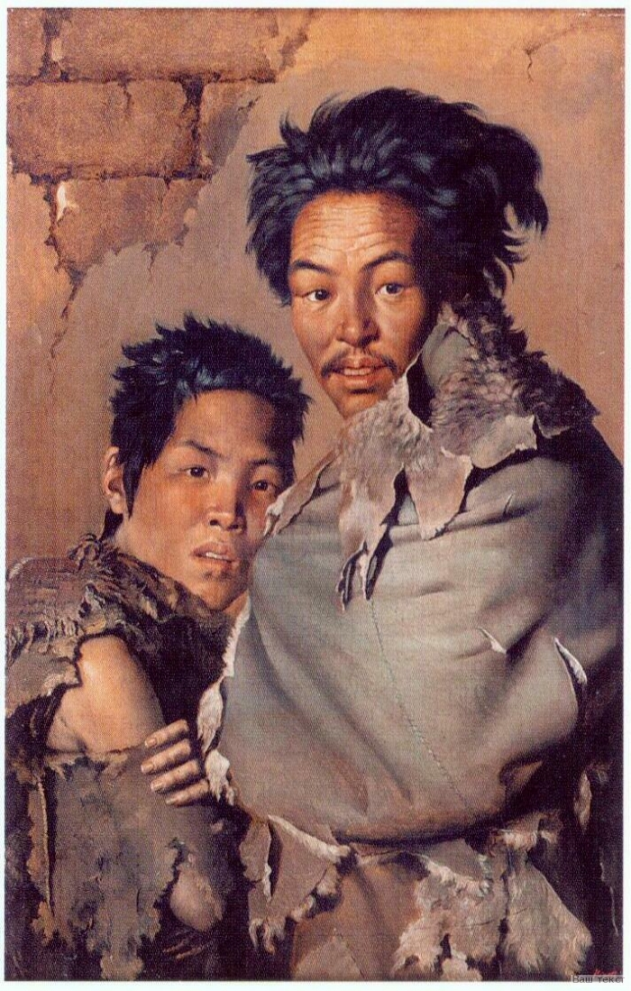 Китайские нищие на холоде, худ. Лев Игорев (1823-1893) ГТГ, Москва